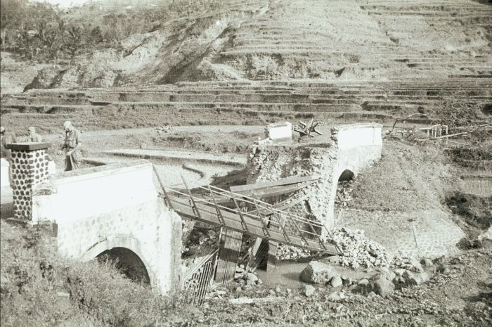 negatief. Militairen van de genie bij een kapotte brug, tijdens de eerste politionele actie